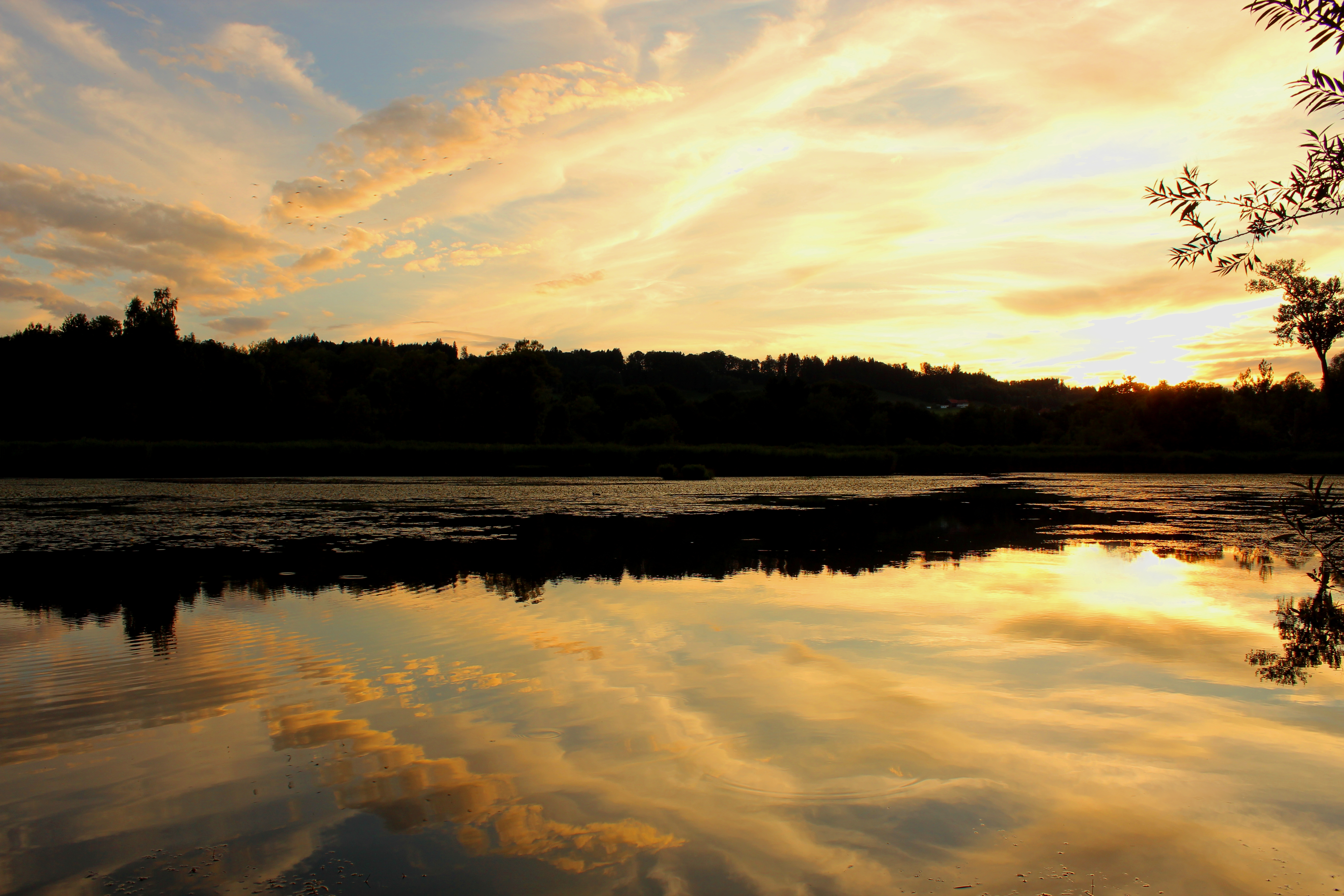 Schwabelsberger Weiher